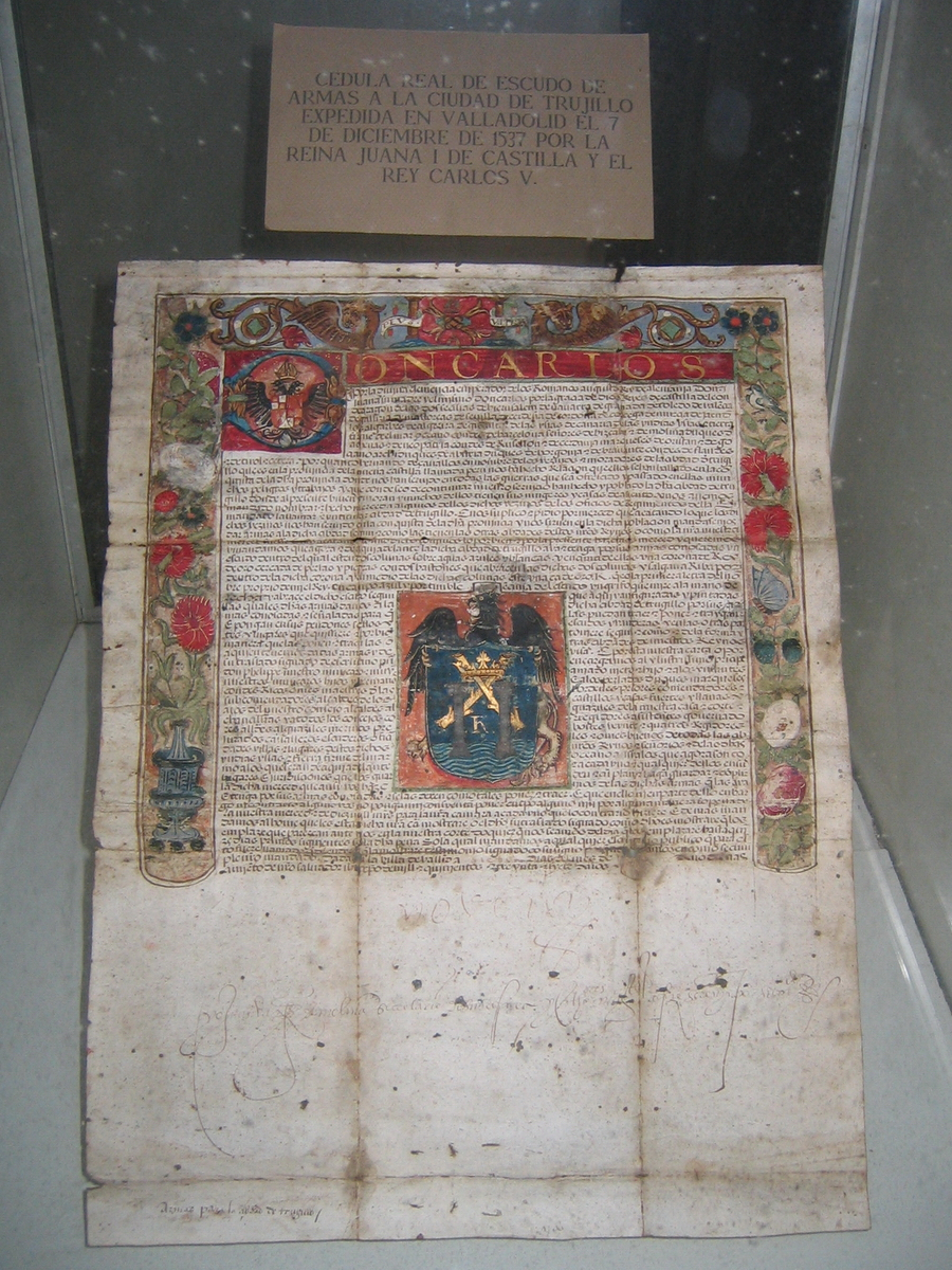 Real cédula de otorgamiento de "Escudo de Armas" a la ciudad de Trujillo (Perú) firmado en Valladolid (España) en el 7 de Diciembre de 1537.